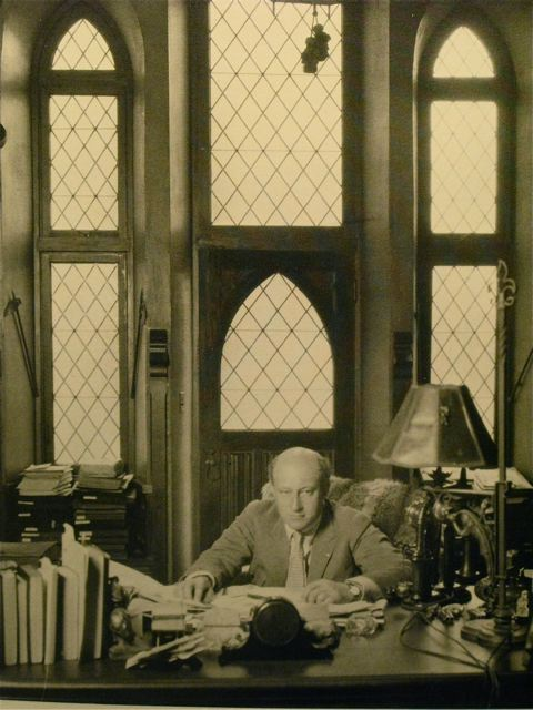 Режиссёр и продюсер Сесиль Б. Демилль в своем кабинете, 1919 год. Фото Карла Страсса.